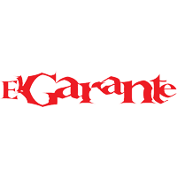 Logo de la miniserie El Garante de Sebastián Borensztein